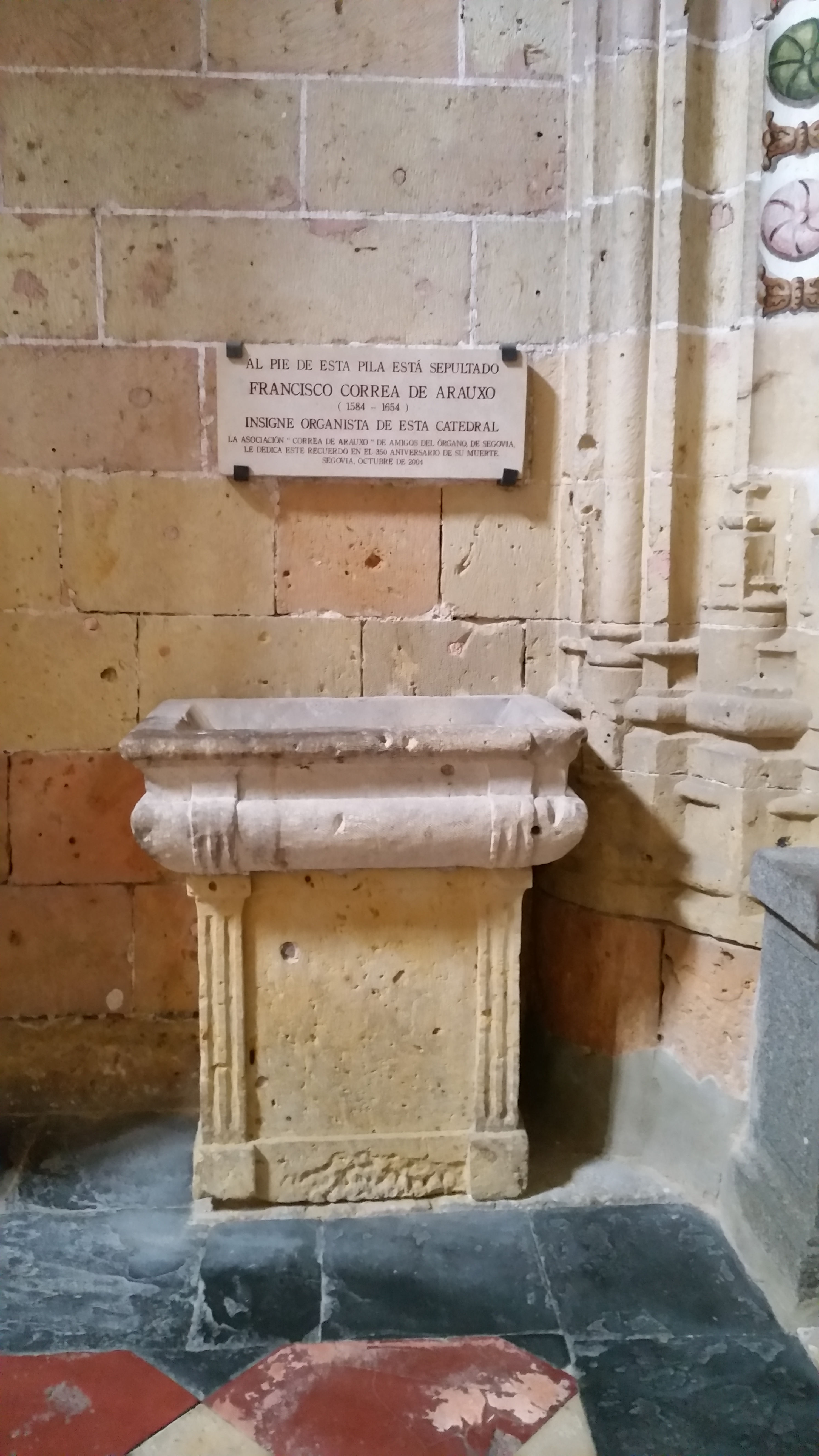 Catedral de Segovia - Tumba Francisco Correa de Arauxo «Al pie de esta pila está sepultado Francisco Correa de Arauxo (1584-1654) insigne organista de esta catedral. Asociación "Correa de Arauxo" de amigos del órgano de Segovia le dedica este recuerdo en el 350 aniversario de su muerte. Segovia, octubre de 2004»